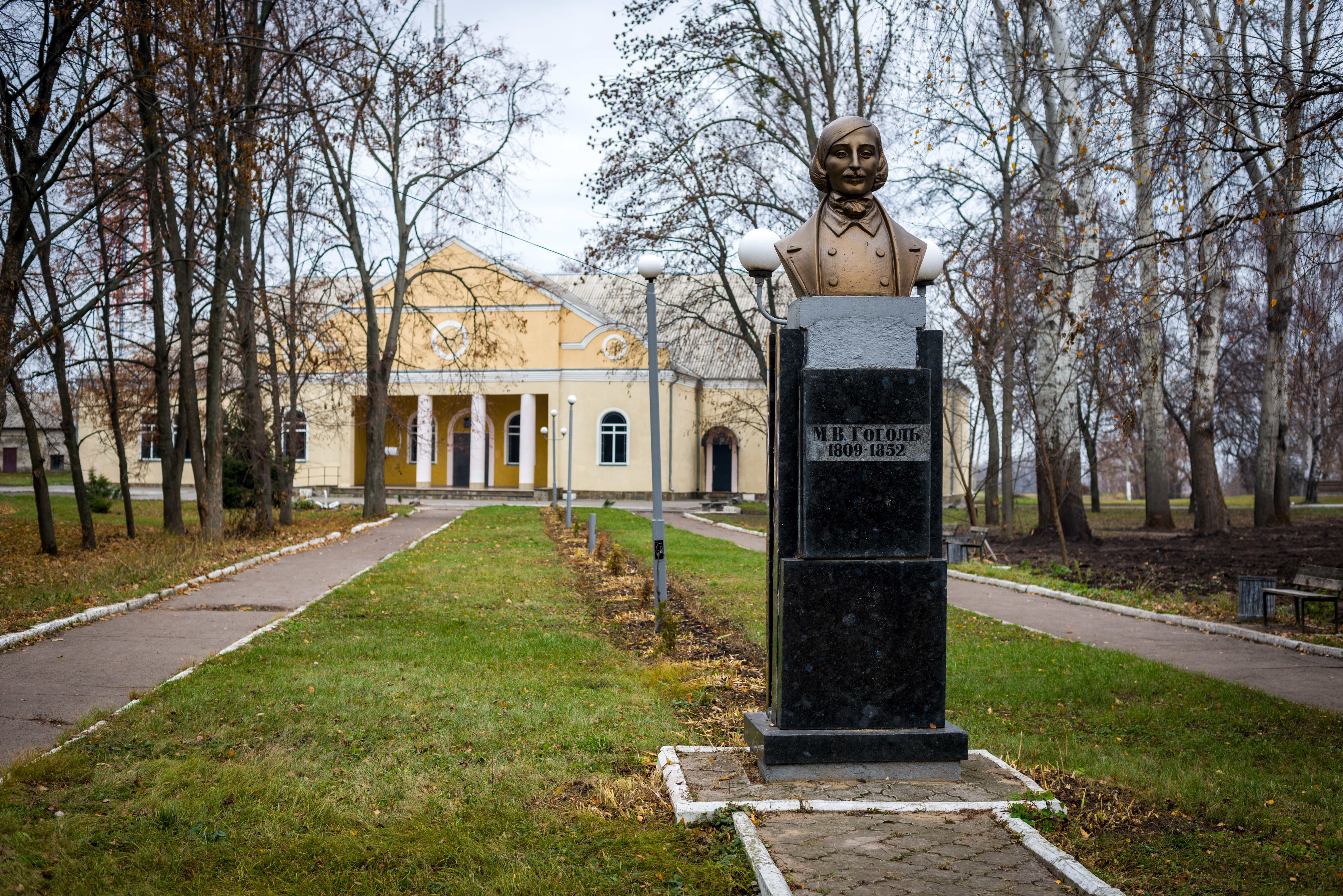 Пам'ятник-бюст М. В. Гоголю, смт Шишаки, вул. Корлініча